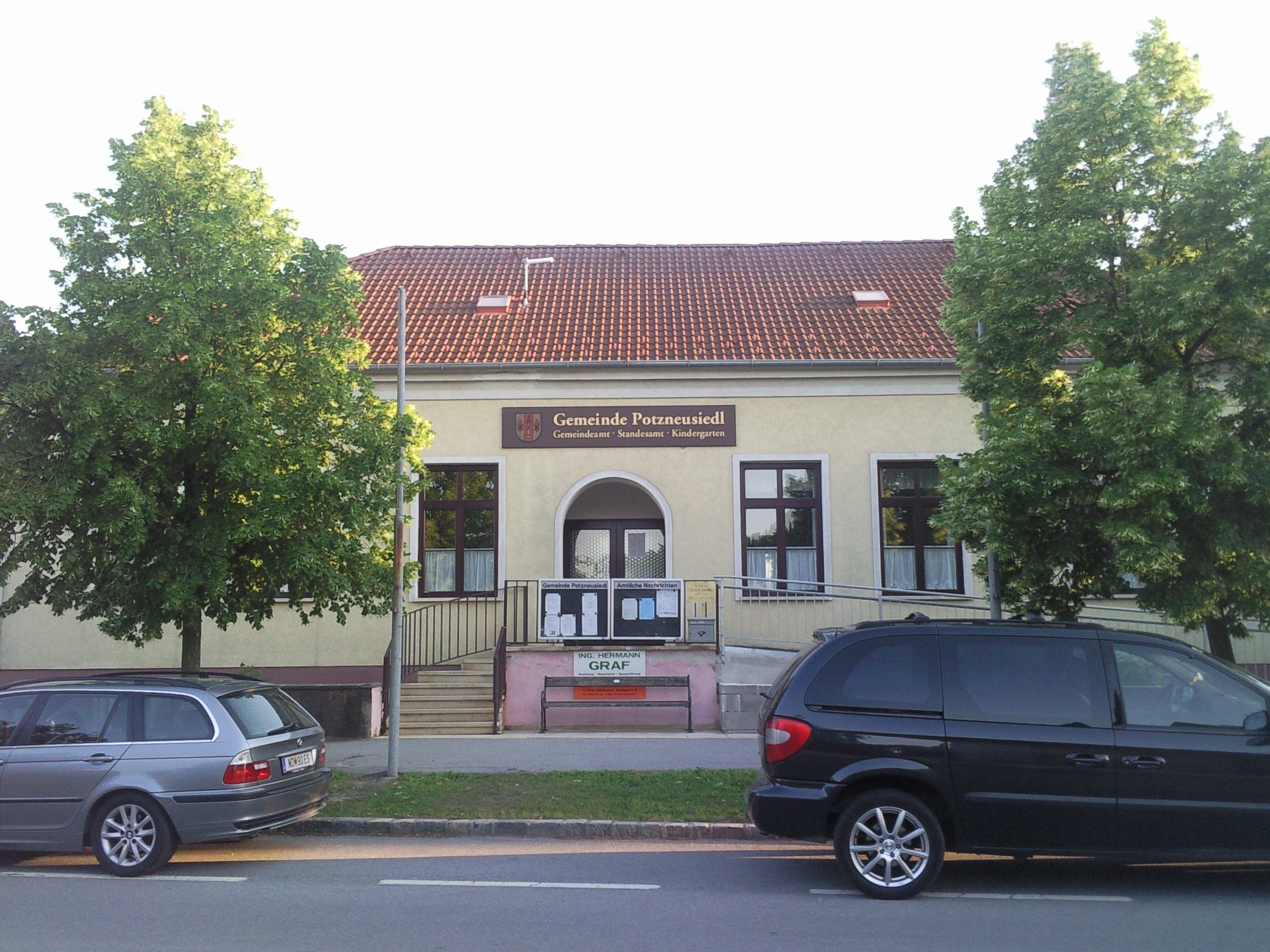 Potzneusiedl